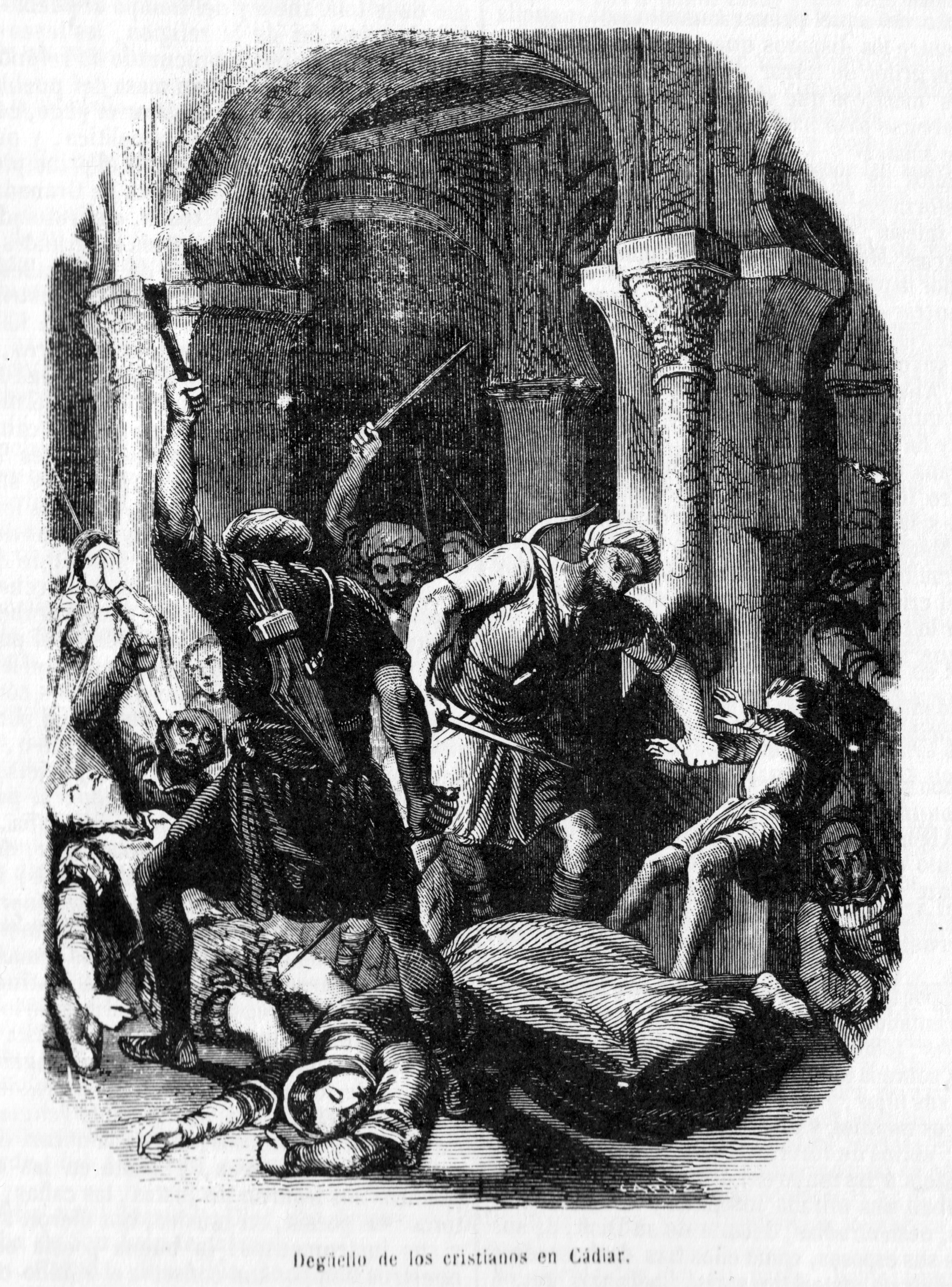 Deguello de los cristianos en Cadiar